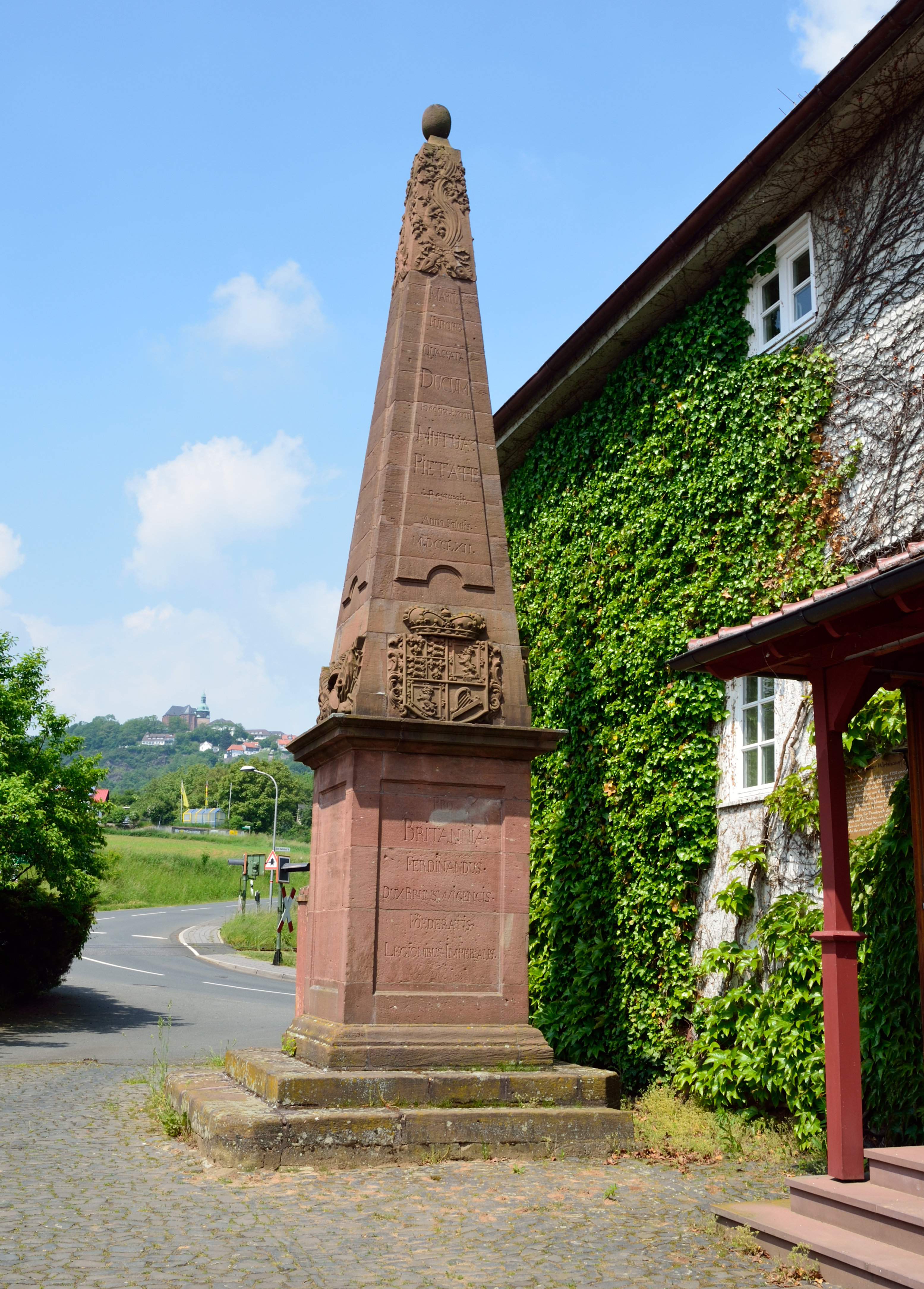 Der Friedenstein am Brücker Wirtshaus bei der Brücker Mühle in Amöneburg. Siehe dazu Schlacht an der Brücker Mühle.